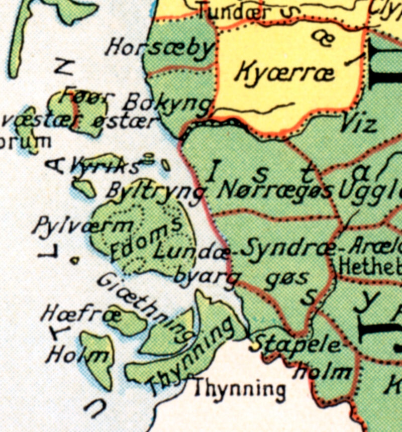 Gøs Herreder i Sydslesvig